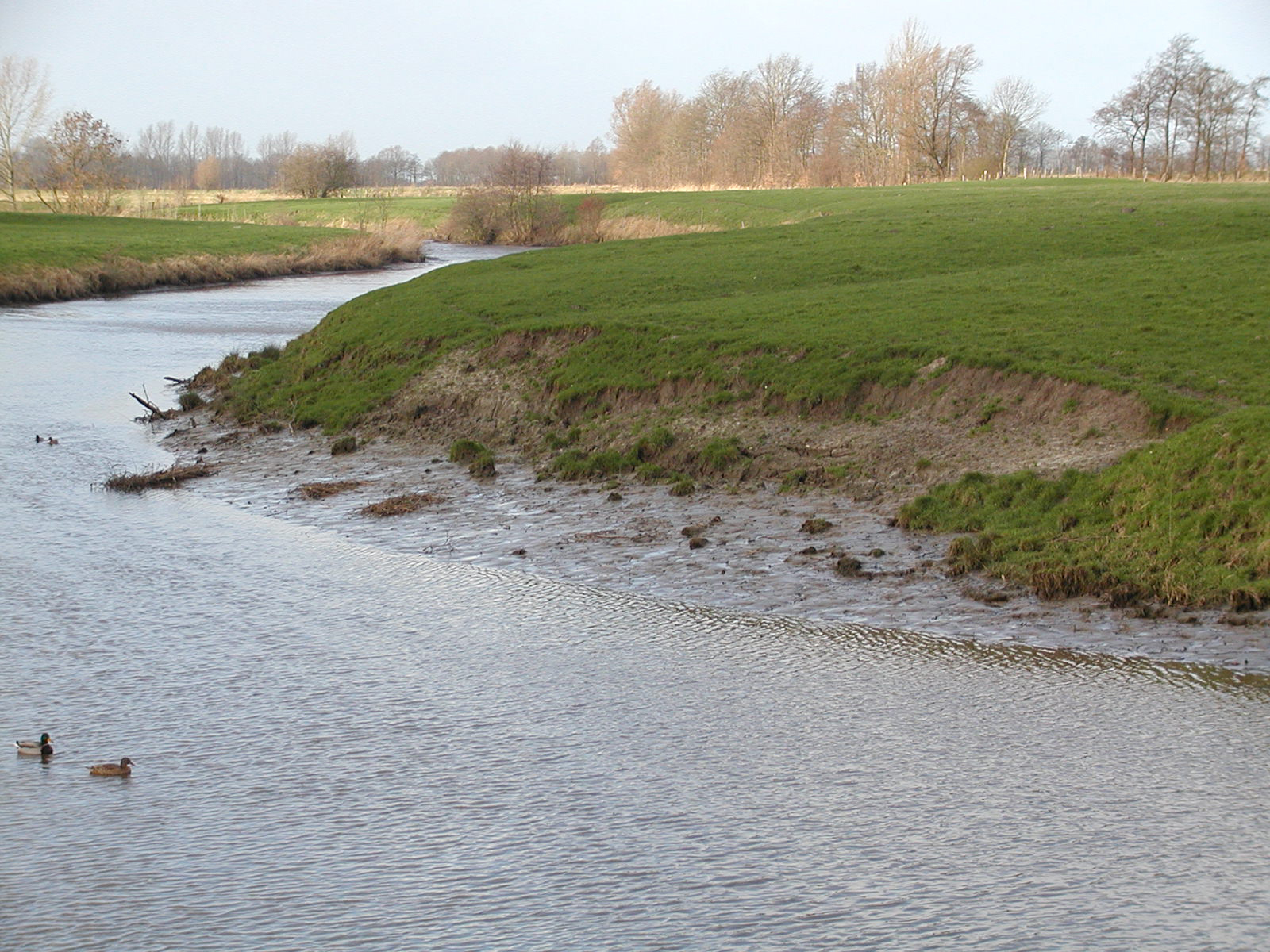 Die Aue in Neuhaus